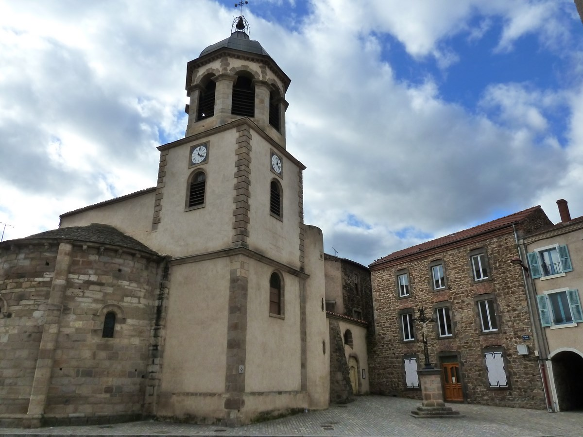 Lempdes sur Allagnon - Haute-Loire - France - Église Saint-Géraud, du XIe siècle. Chœur du XIIe siècle - XIXe siècle.